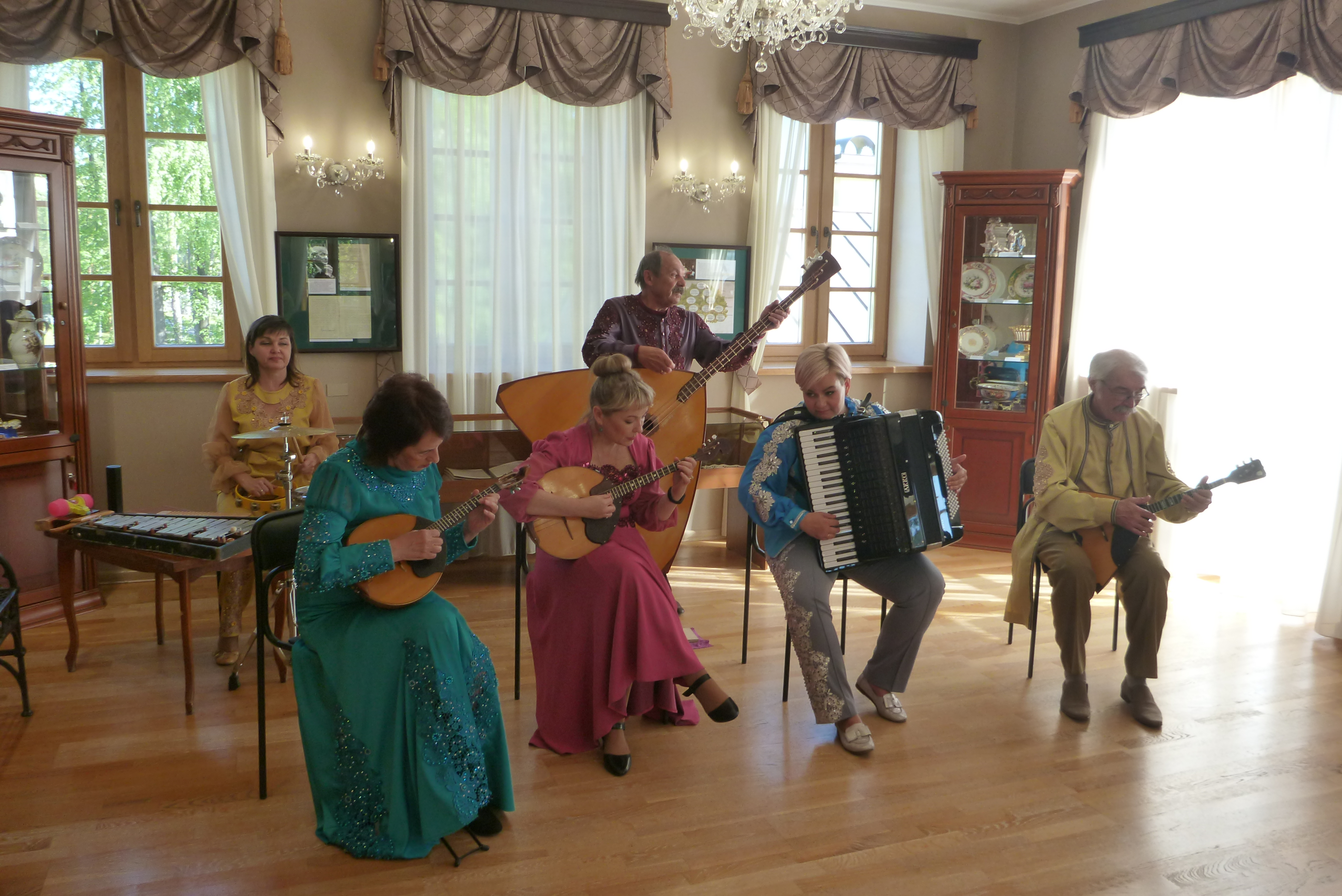 Ансамбль на Демидовской даче 8 июня 2019 года